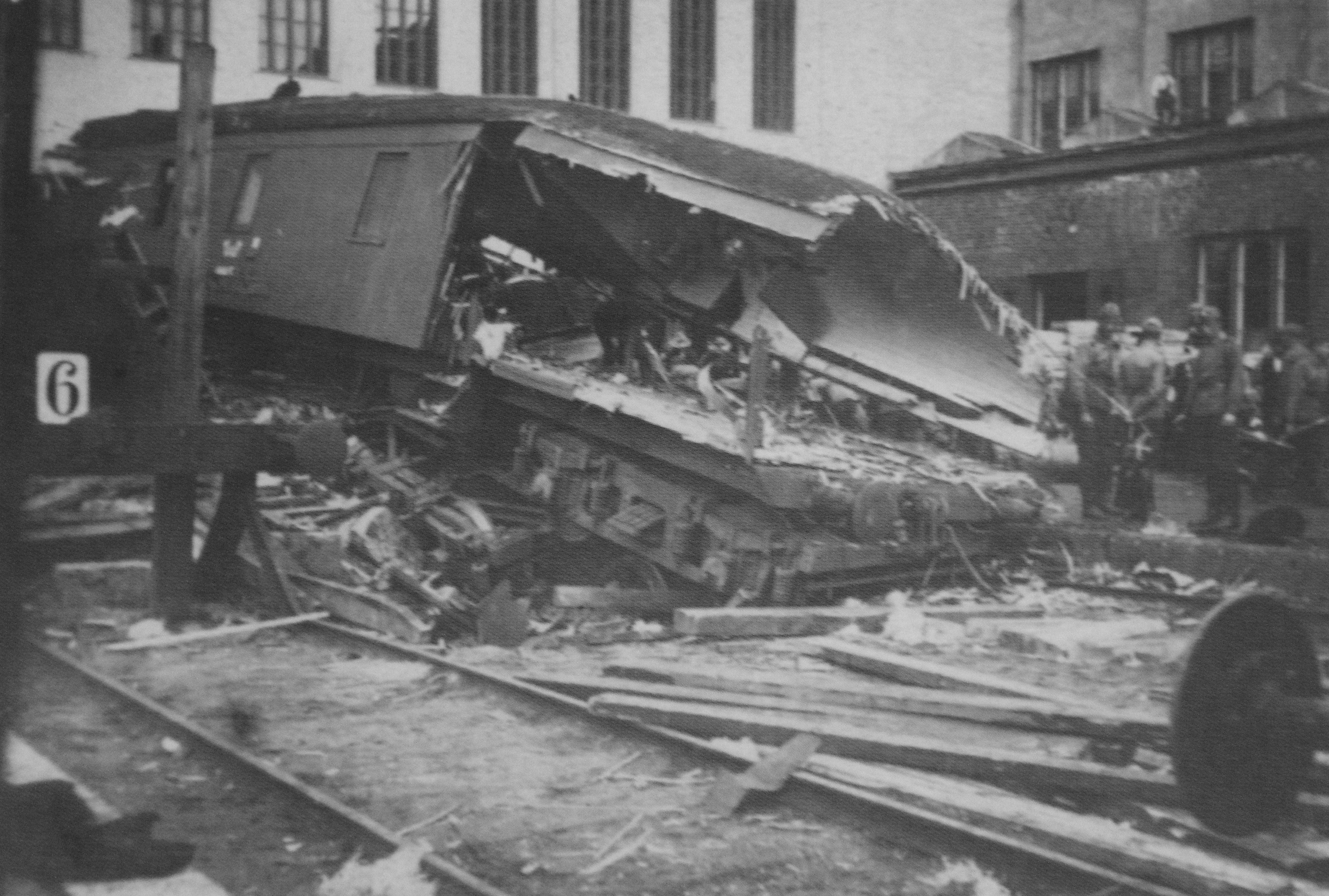 Matkustajajunan veturi ajoi 28. elokuuta 1926 Helsingin rautatieaseman päätelaiturikatokseen junan jarrujen mentyä epäkuntoon.